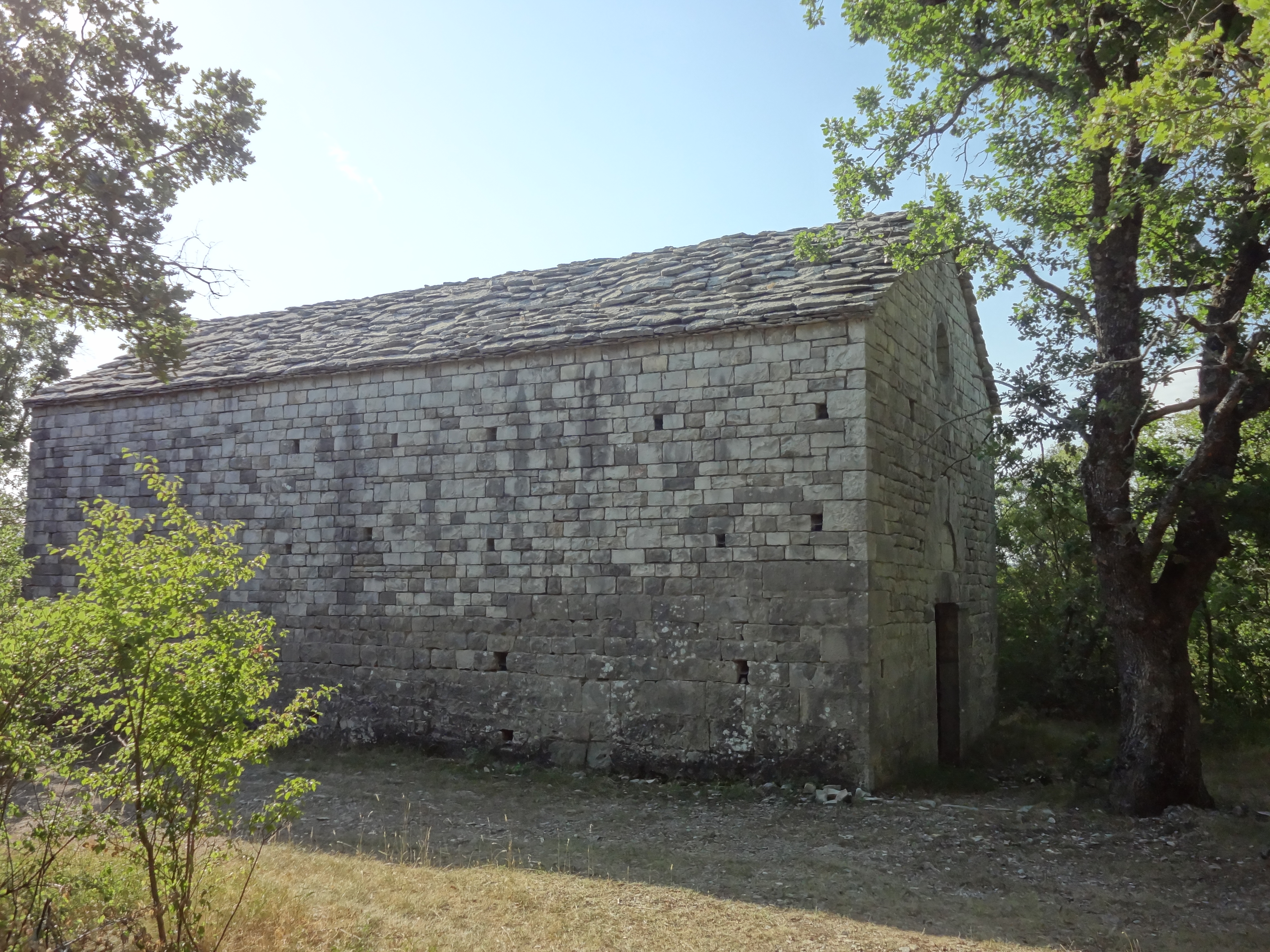 chapelle Sainte-Madeleine à Châteauneuf-Val-Saint-Donat (XIIe)